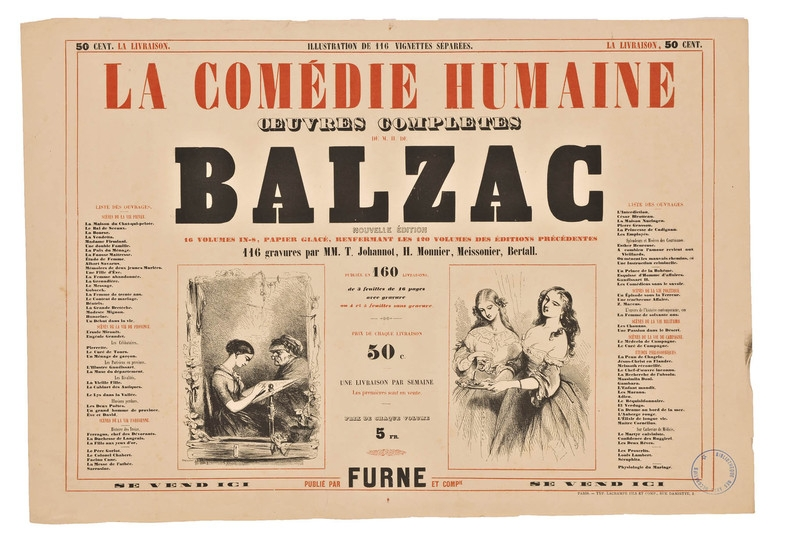 Prospectus pour la première édition de La Comédie humaine publiée chez Furne.